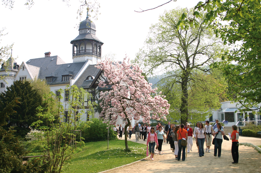 Hochschulcampus